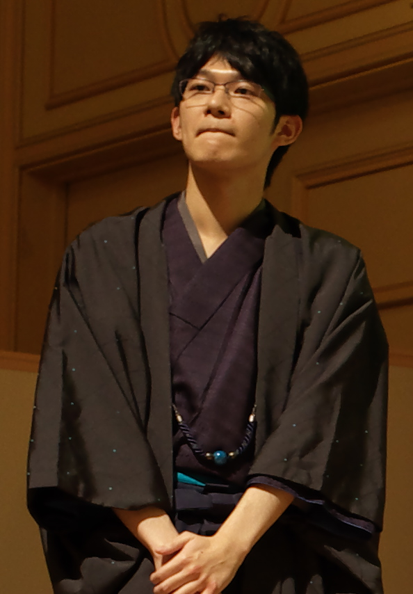 2018年10月2日 第66期王座戦五番勝負第3局 対局終了後の斎藤慎太郎七段。